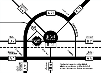 Anreise zur Messe Erfurt